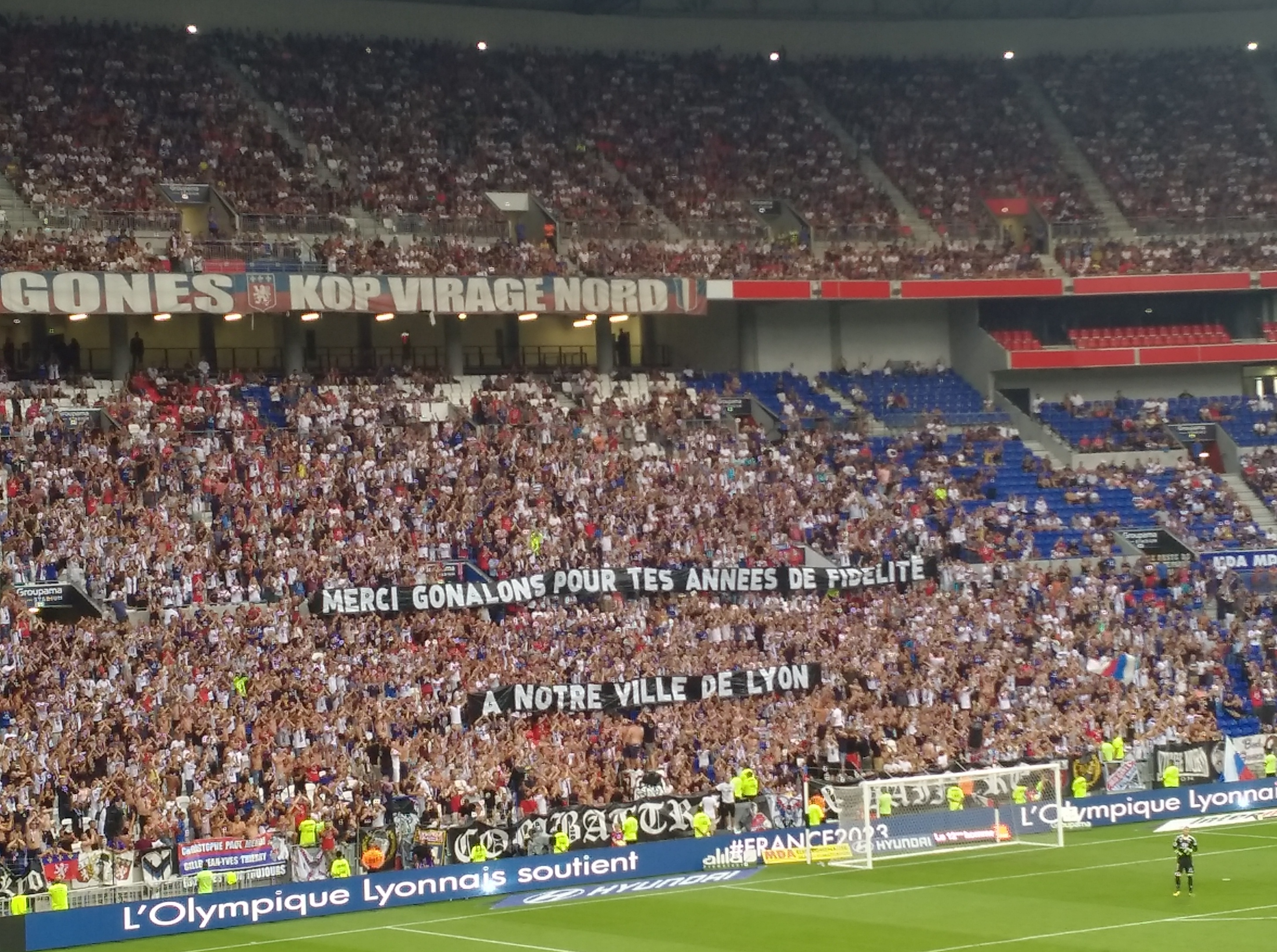 Banderoles en hommage à Maxime Gonalons brandies par les Bad Gones lors du match Lyon-Strasbourg lors de la 1re journée de Ligue de la saison 2017-2018.